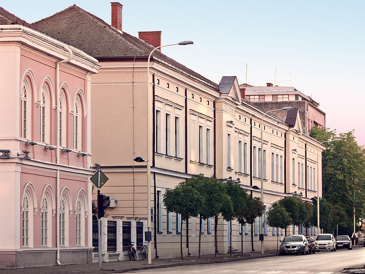 Europeana I wanted this to look like an old postcard so I waited for the right time of day, until I was satisfied with the lighting, to capture this shot.